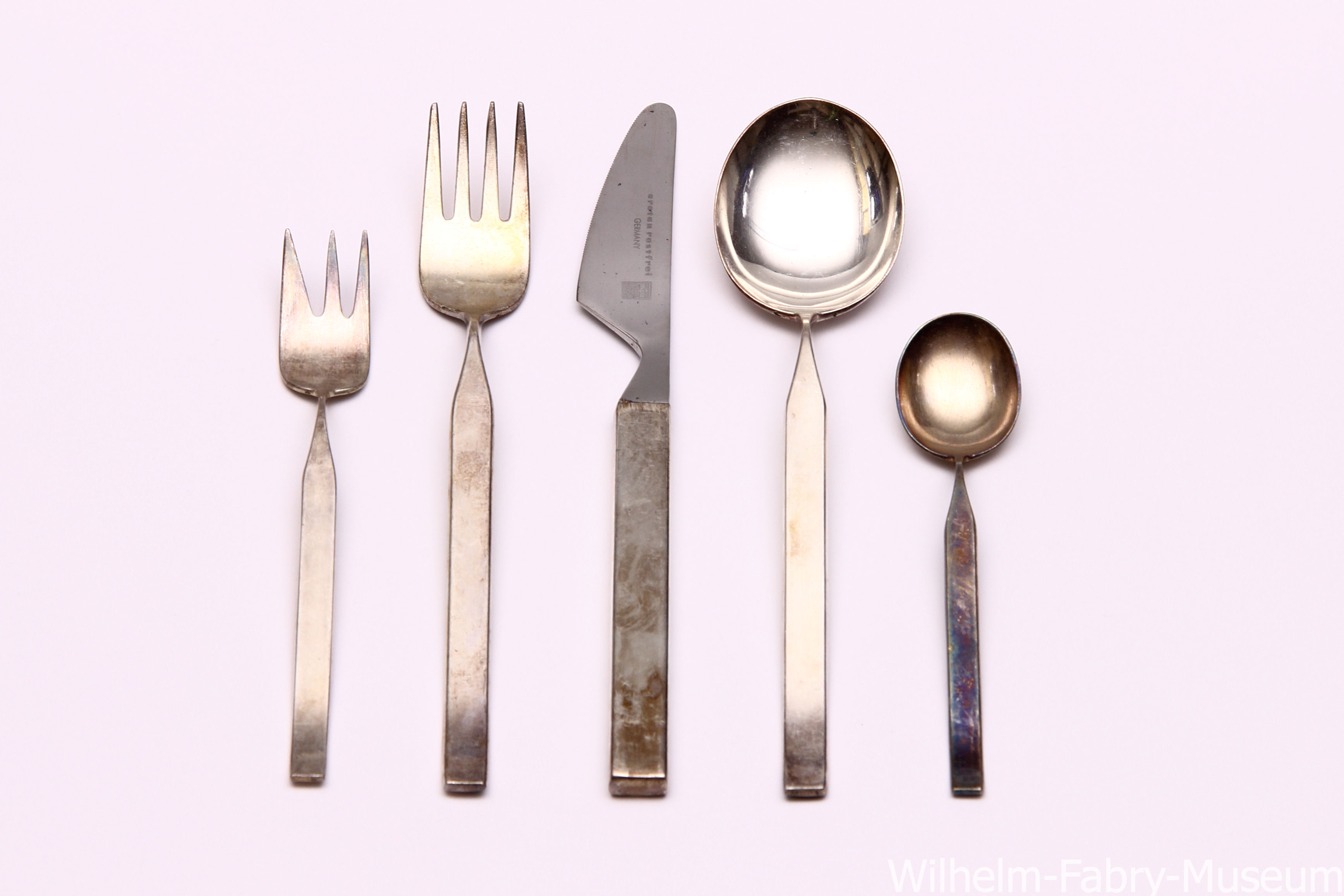 Ansicht Bestecke Heimendahl & Keller